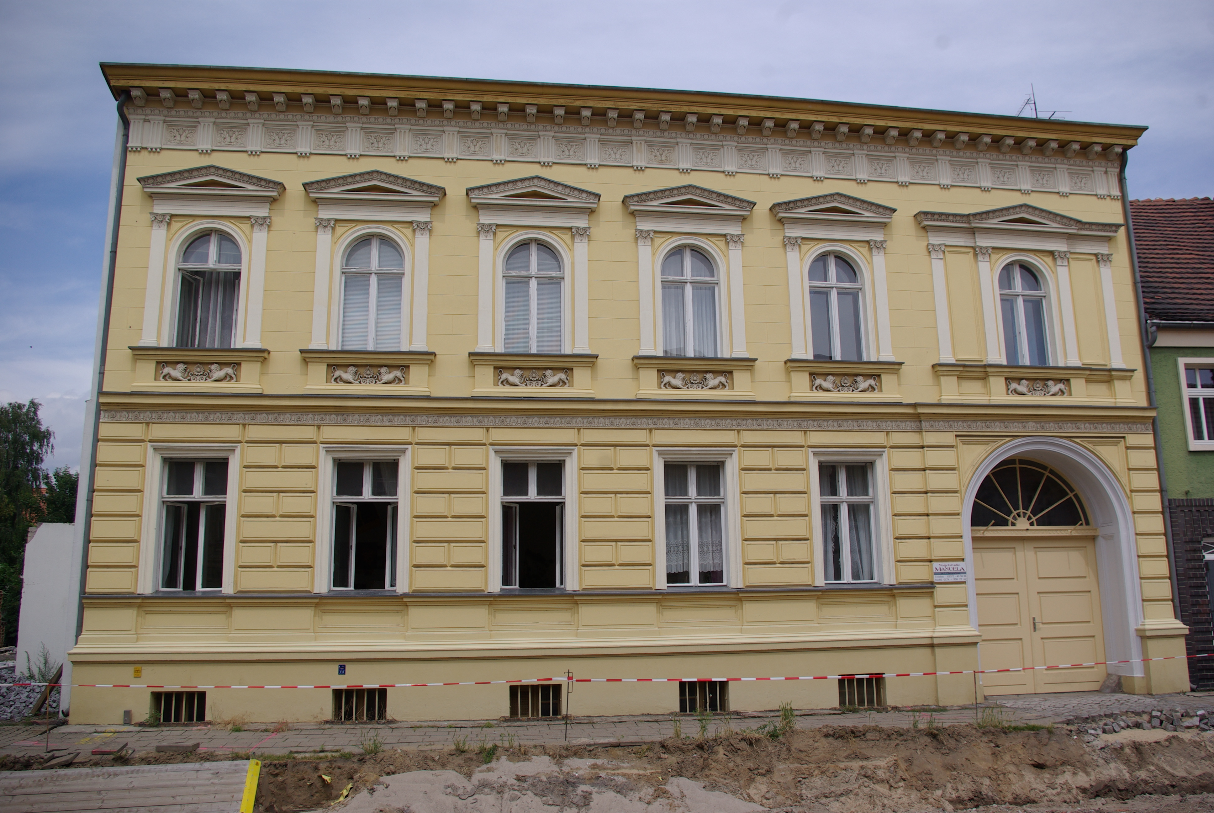 Jüterbog in Brandenburg. Das Haus steht in der Straße Planeberg 5. Die Fassade ist denkmalgeschützt.